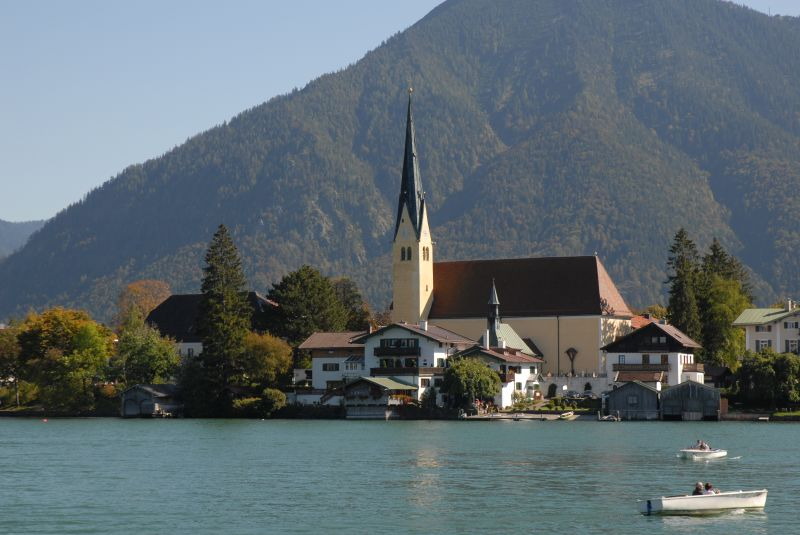 St. Laurentius Kirche Rottach-Egern am Tegernsee, Oberbayern